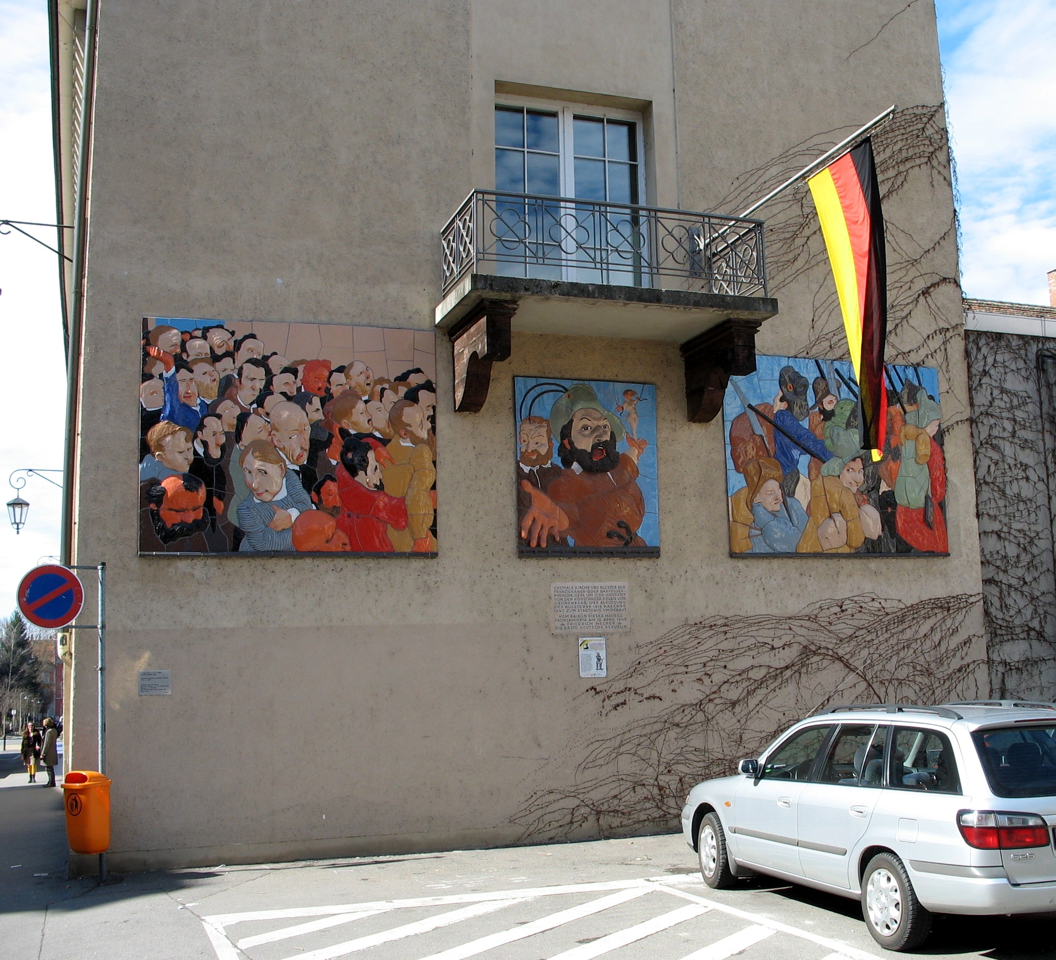 Ostfassade des Stadthauses von Konstanz (ehem. Franziskanerkirche), Balkon und Relief des Heckerzuges. Das Relief wurde von Johannes Grützke 1996/98 gestaltet. In der Mitte Friedrich Hecker als Volkstribun, links die ablehnenden Städter, rechts der Heckerzug.